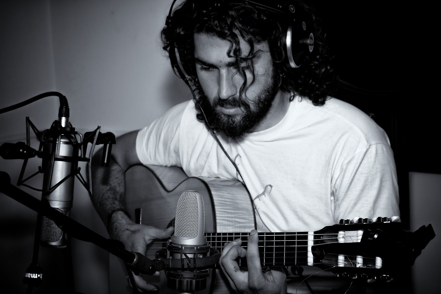 Alejandro Astola durante la grabación de Rockallano